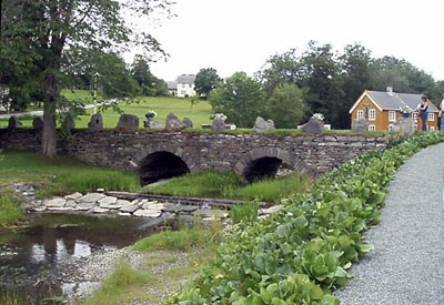 Musstrøparken park Inderøy, Norway